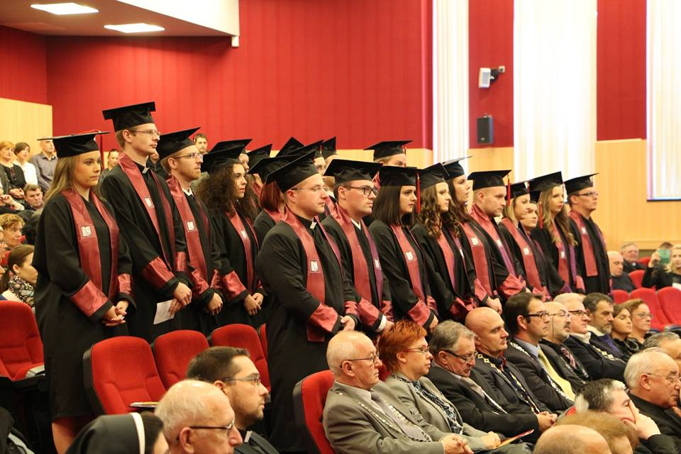 Diplomanti